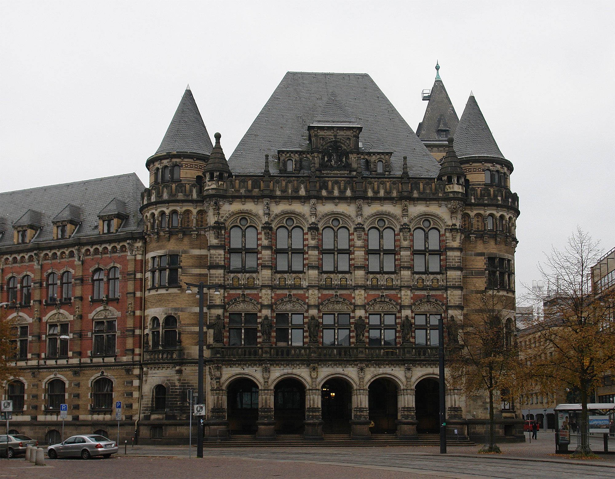 Landgericht Bremen an der Domsheide Das abgebildete Objekt ist ein geschütztes Kulturdenkmal in der Freien Hansestadt Bremen, mit der Nr. 0317 beim Landesamt für Denkmalpflege registriert.